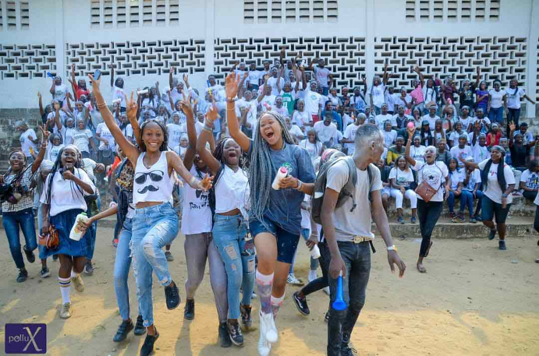 À Kinshasa et même au Congo, la réussite l'Examen d'État communément appelé exetat, est un événement qui engendre des vives émotions, sur cette image on voit des élèves de L'Institut Du Mont Amba de L'Université de Kinshasa, célébrant avec dance et musique leurs réussites